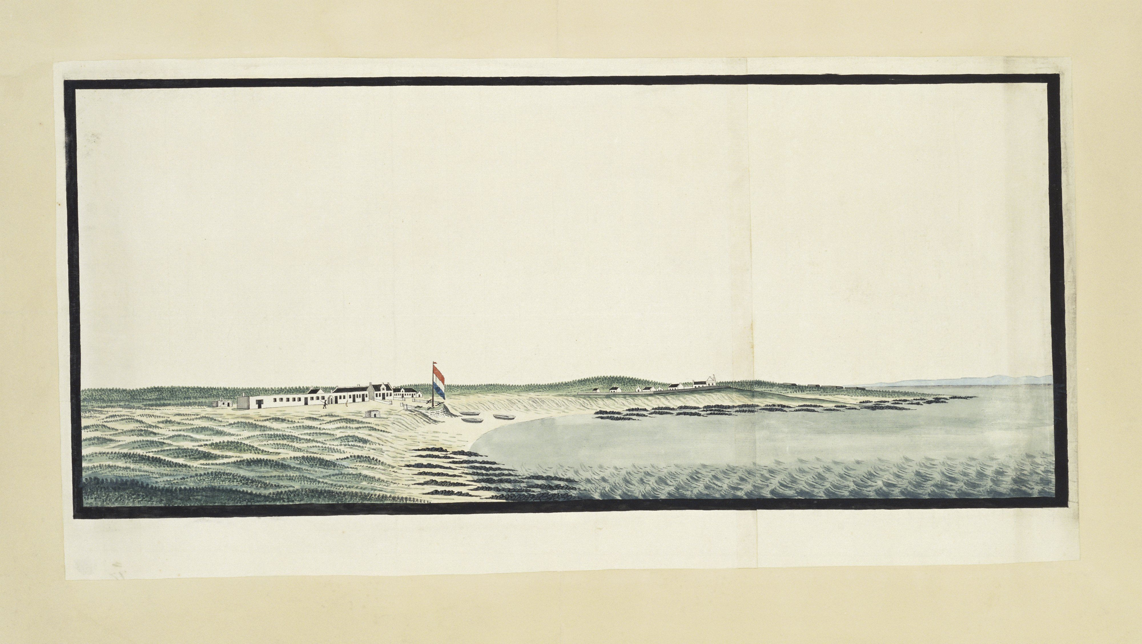 IdentificatieTitel(s): Het Posthoudershuis op Robbeneiland, vanuit zee gezienObjecttype: tekening topografische tekening Objectnummer: RP-T-1914-17-25VervaardigingVervaardiger: tekenaar: Robert Jacob Gordon (toegeschreven aan)tekenaar: Johannes Schumacher (mogelijk)Plaats vervaardiging: KaapprovincieDatering: ca. 1777Fysieke kenmerken: pen in inkt over een ondertekening in potlood, penseel in waterverf in groen, blauw en enig rood, voorzien van een kaderMateriaal: papier inkt potlood waterverf Techniek: pen / penseelAfmetingen: albumblad: h mm × b mmblad: h 280 mm × b 660 mmToelichtingOorspronkelijk in omslag van roodkleurig halfleer en roodgemarmerd plat, dorso met ribben en goudopdruk; 71 x 99 x 6 cm. .Verwerving en rechtenCredit line: Aankoop met steun van particulierenVerwerving: aankoop 1914Copyright: Publiek domein